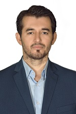 Kosovarischer Politiker